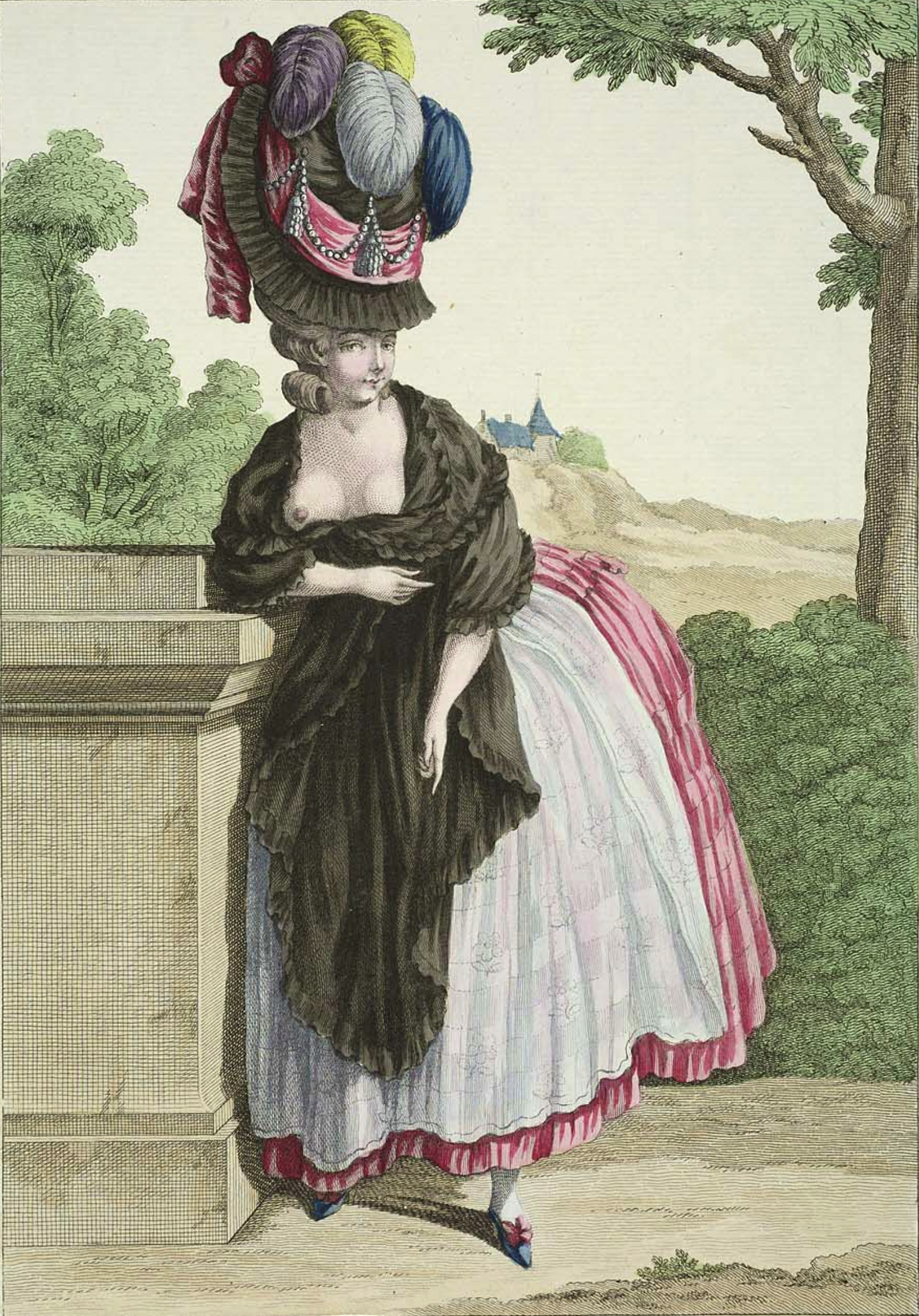 Plate 63 from Gallerie des Modes et Costumes Français. 11e. Cahier des Costumes Français. 5e Suite d'Habillemens à la mode en 1778.